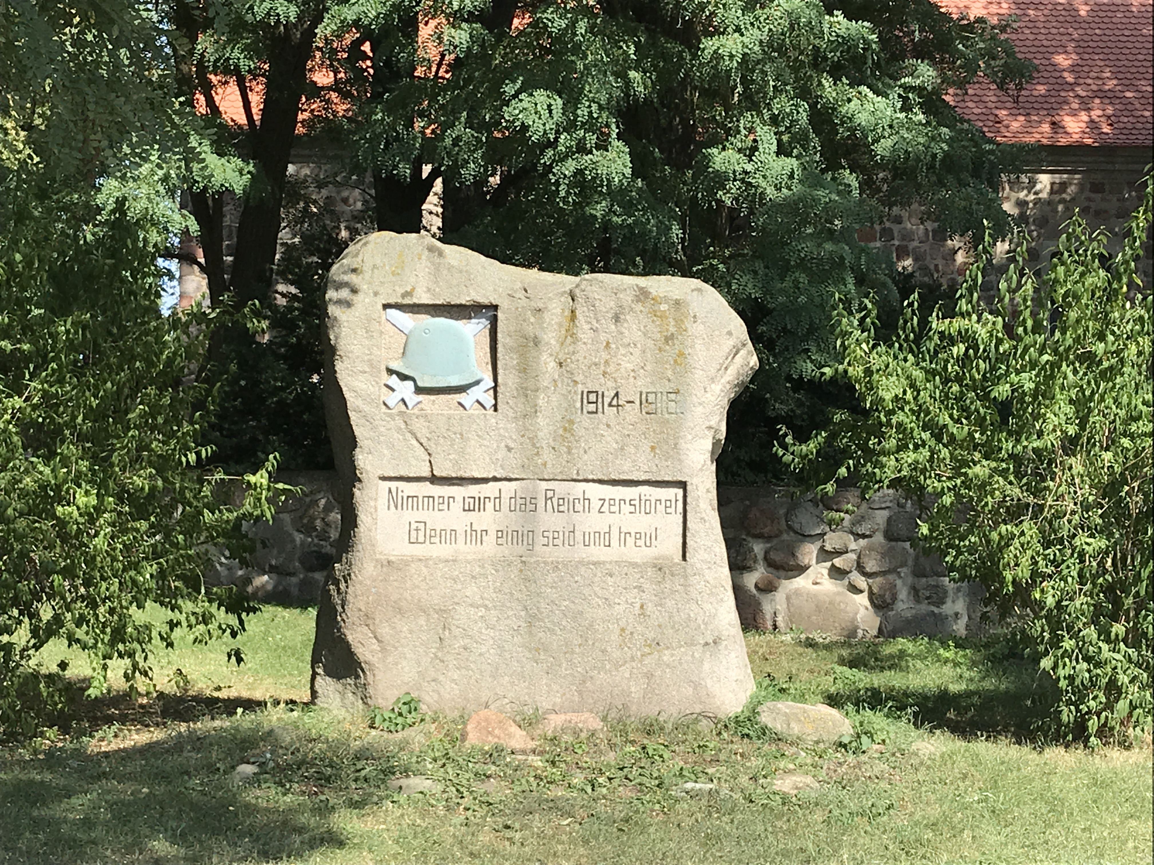 Die Kirche Groß Luckow ist eine Feldsteinkirche aus dem 13. Jahrhundert in Groß Luckow, Landkreis Vorpommern-Greifswald in Mecklenburg-Vorpommern. Im Innern steht unter anderem ein Altarretabel aus dem Jahr 1623.